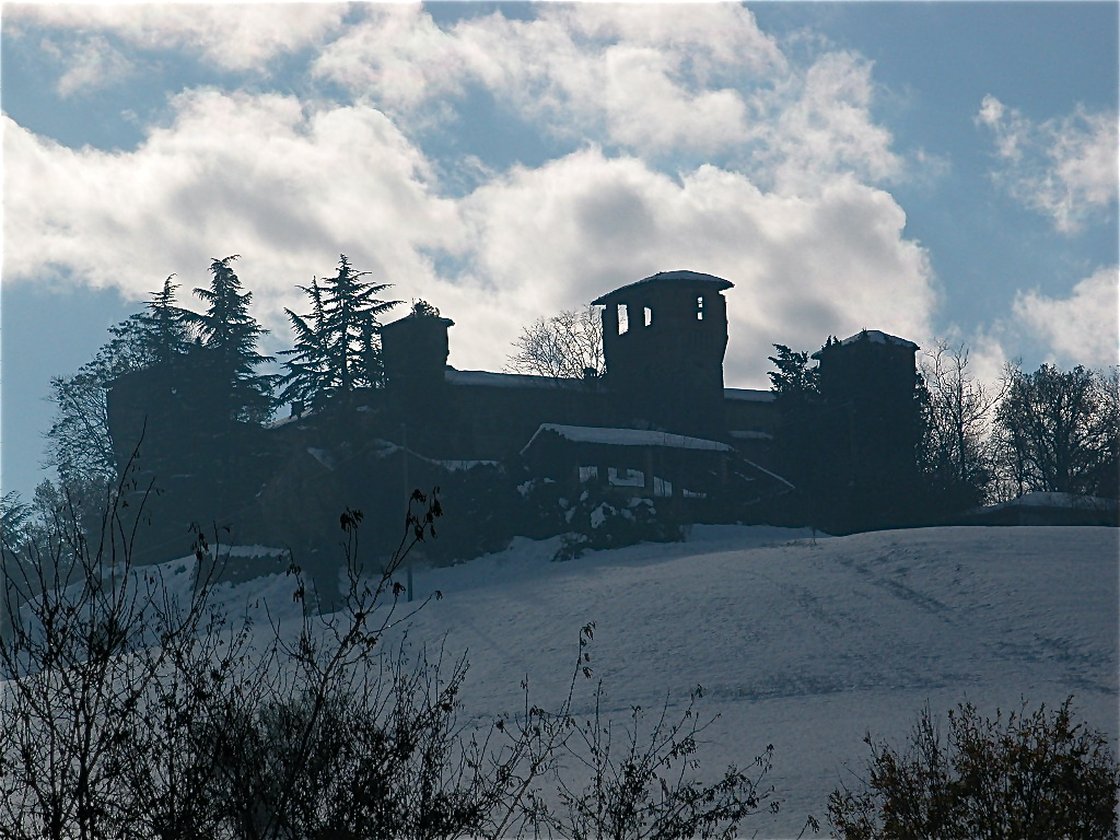 Castello della Boffalora, Agazzano PC Italia